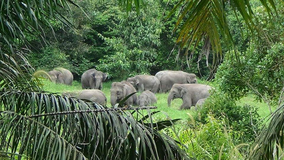 kelompok gajah Balairaja provinsi Riau Indonesia " Bertahan hidup dibumi yang telah punah"